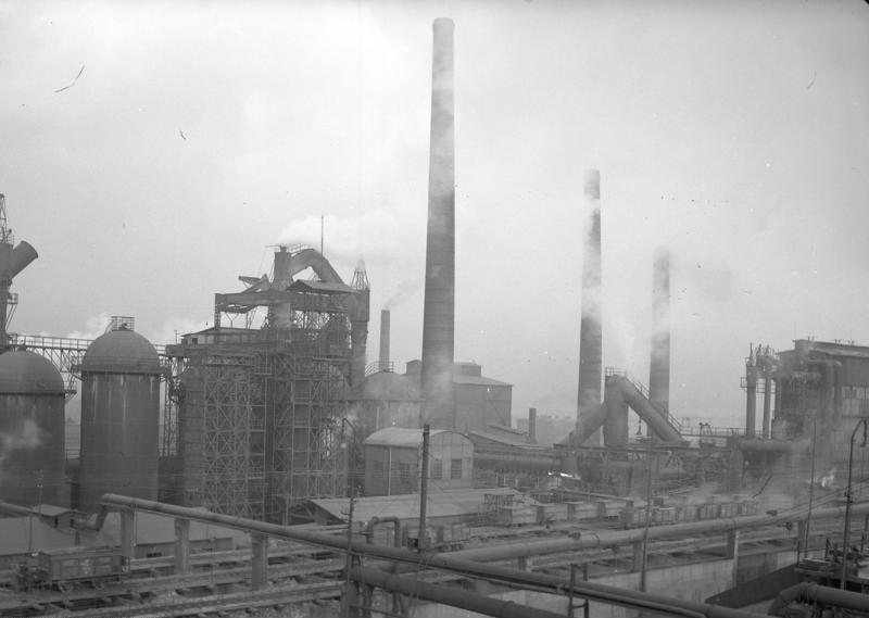 Falvahütte in Schwientochlowitz bei Kattowitz